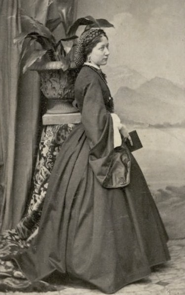 Александра Николаевна Аненнкова, ур. Зубова (1839—1877)